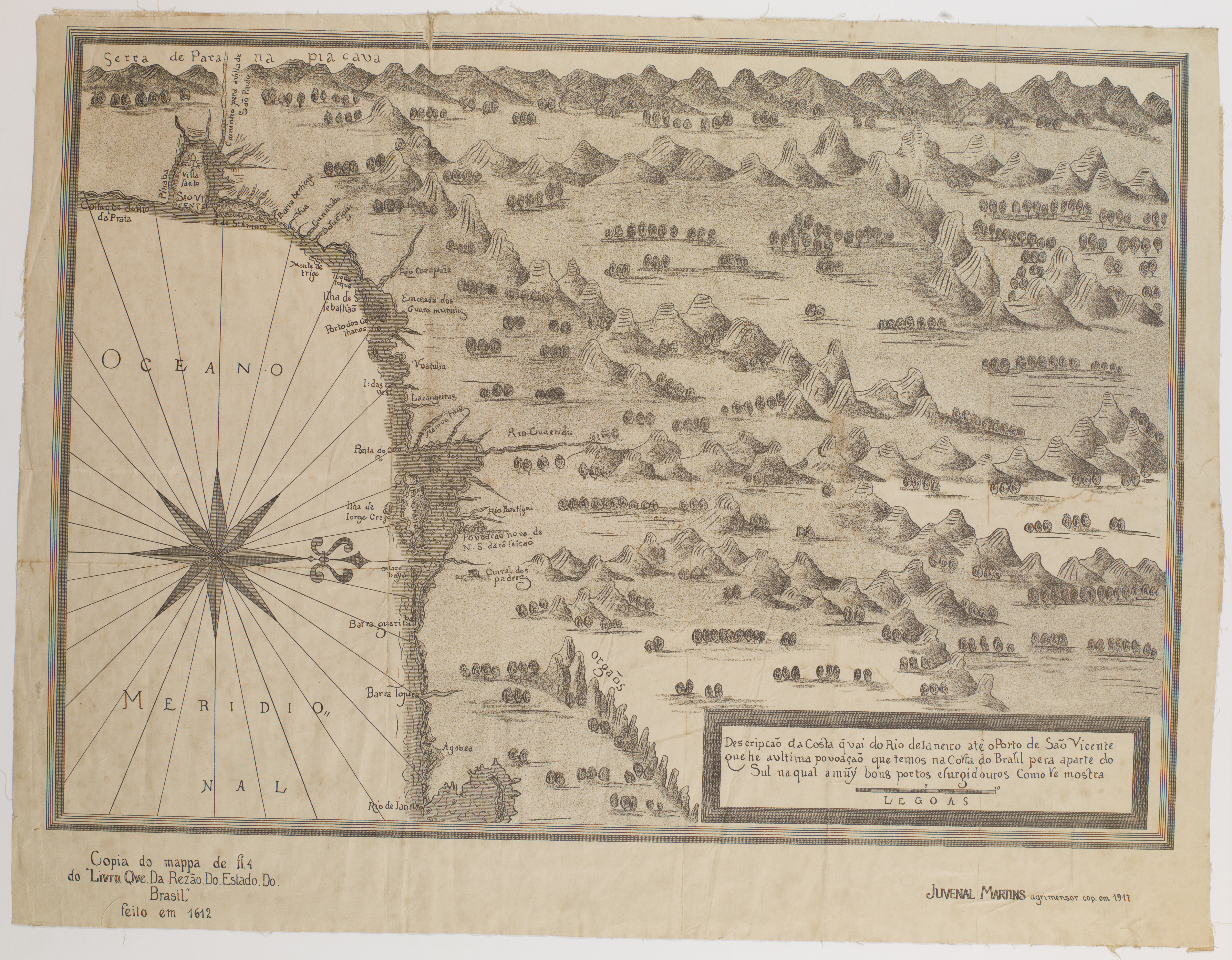 Obra que integra o acervo do Museu Paulista da USP. Coleção João Baptista de Campos Aguirra - Ref. Agente: Livro que da Rezão do Estado do Brasil feito em 1612